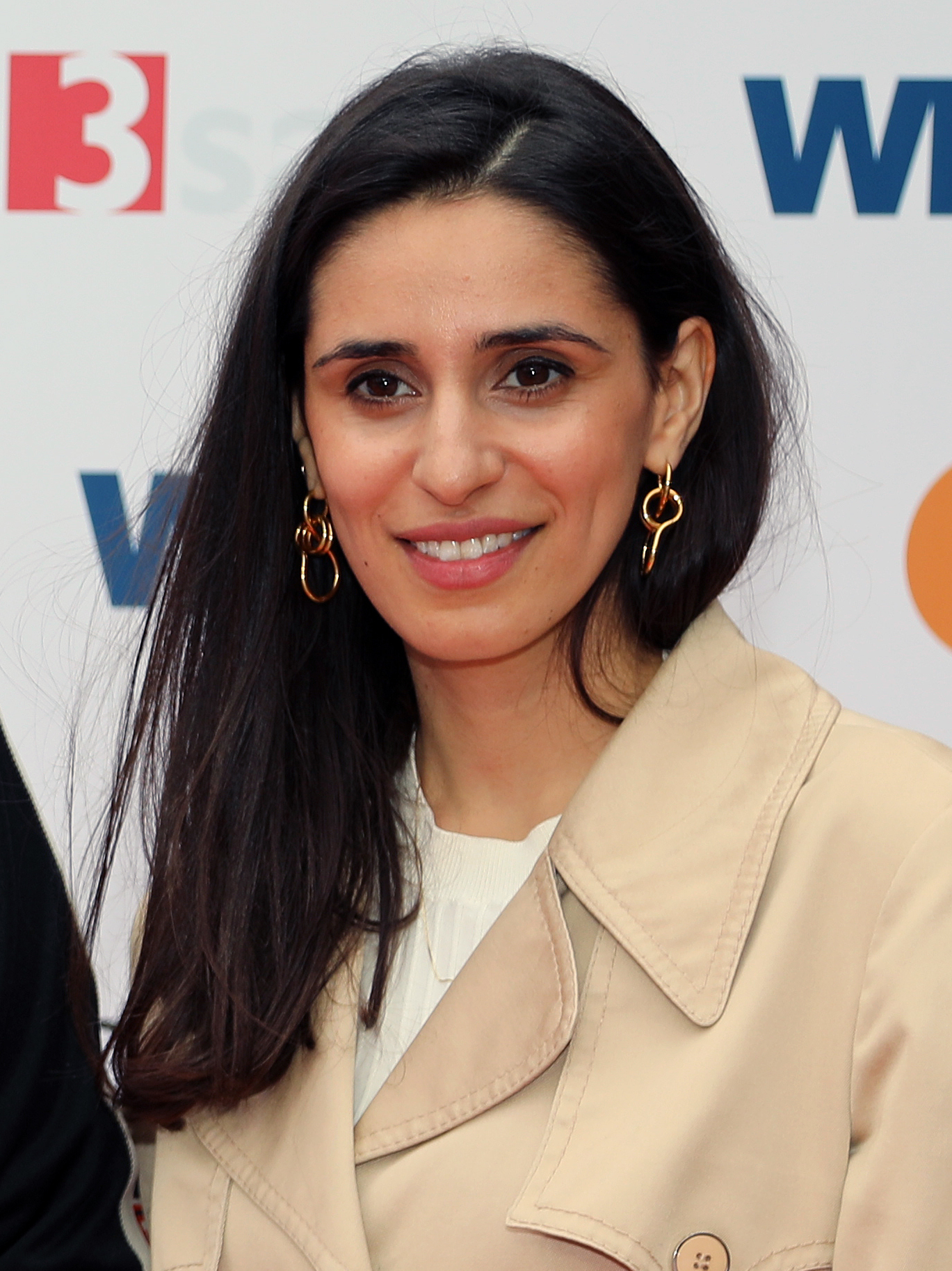 Maryam Zaree, Team von 4 Blocks bei der Grimme-Preis-Verleihung 2018